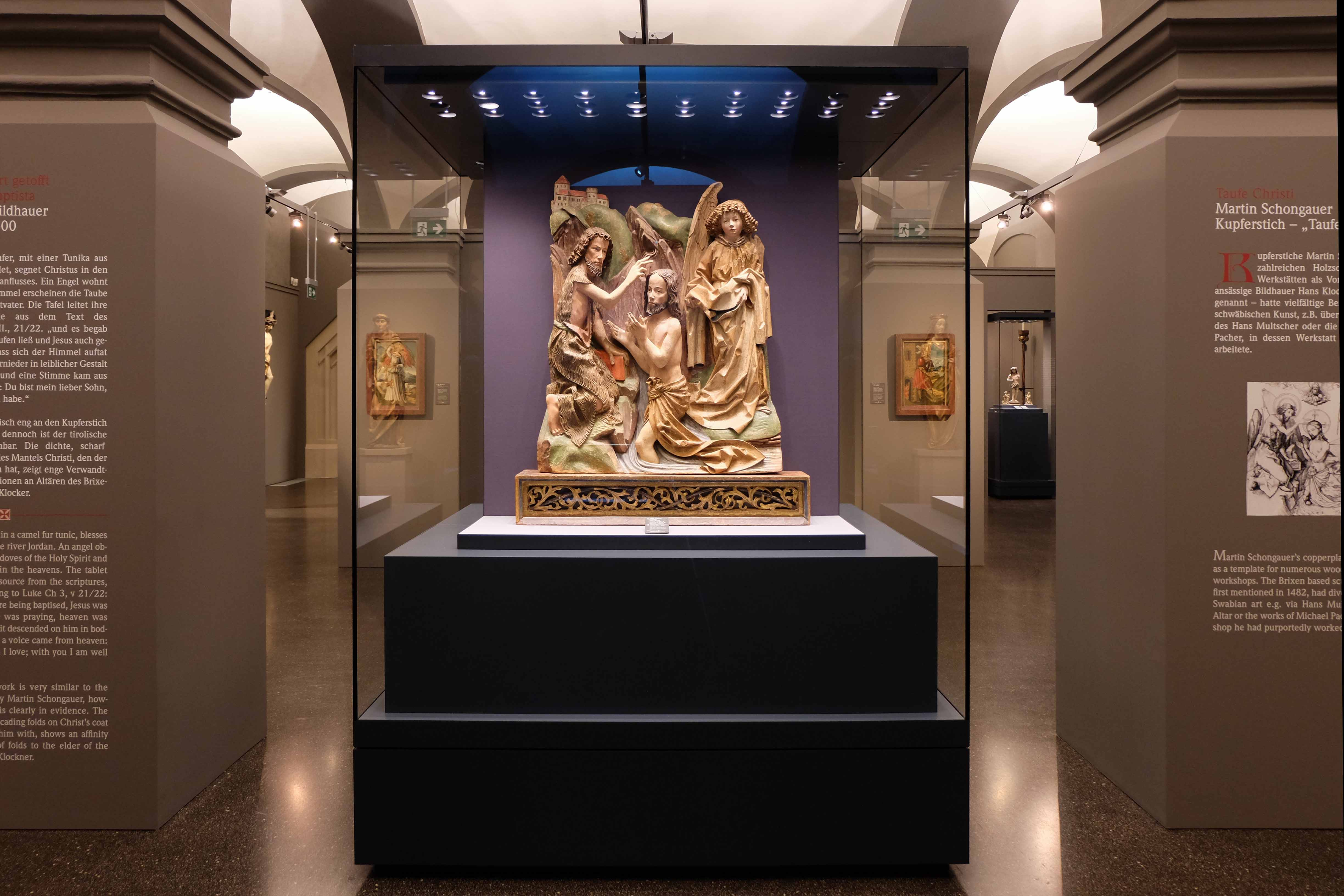 Die neue Abteilung n der Säulenhalle im Museum des Stiftes Admont seit 1. Mai 2017: DEM HIMMEL NAHE - SAMMLUNG MAYER (Kunst des Mittelalters)